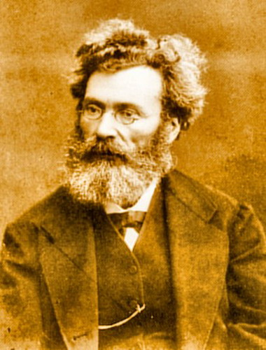 ADOLPHE GOUPIL.jpg (Фотопортрет першого керівника паризької художньої майстерні, друкарні і фірми)